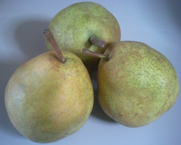 ラ・フランスの写真。撮影:氷鷺 / 撮影機種:au W41CA Category:果物画像